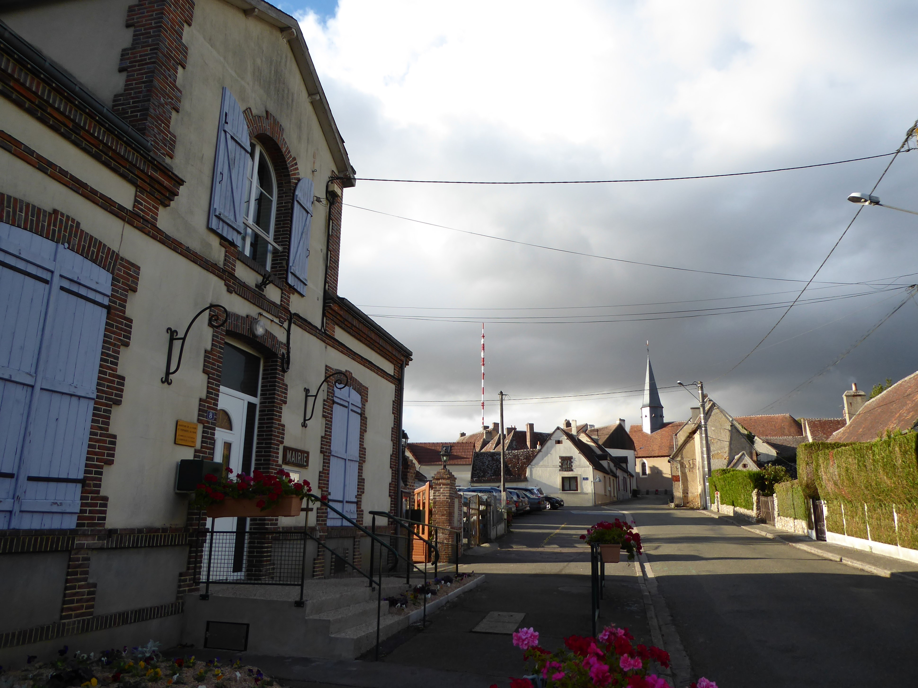 mairie, église Saint-Jacques et émetteur FM, Montlandon, Eure-et-Loir, France.